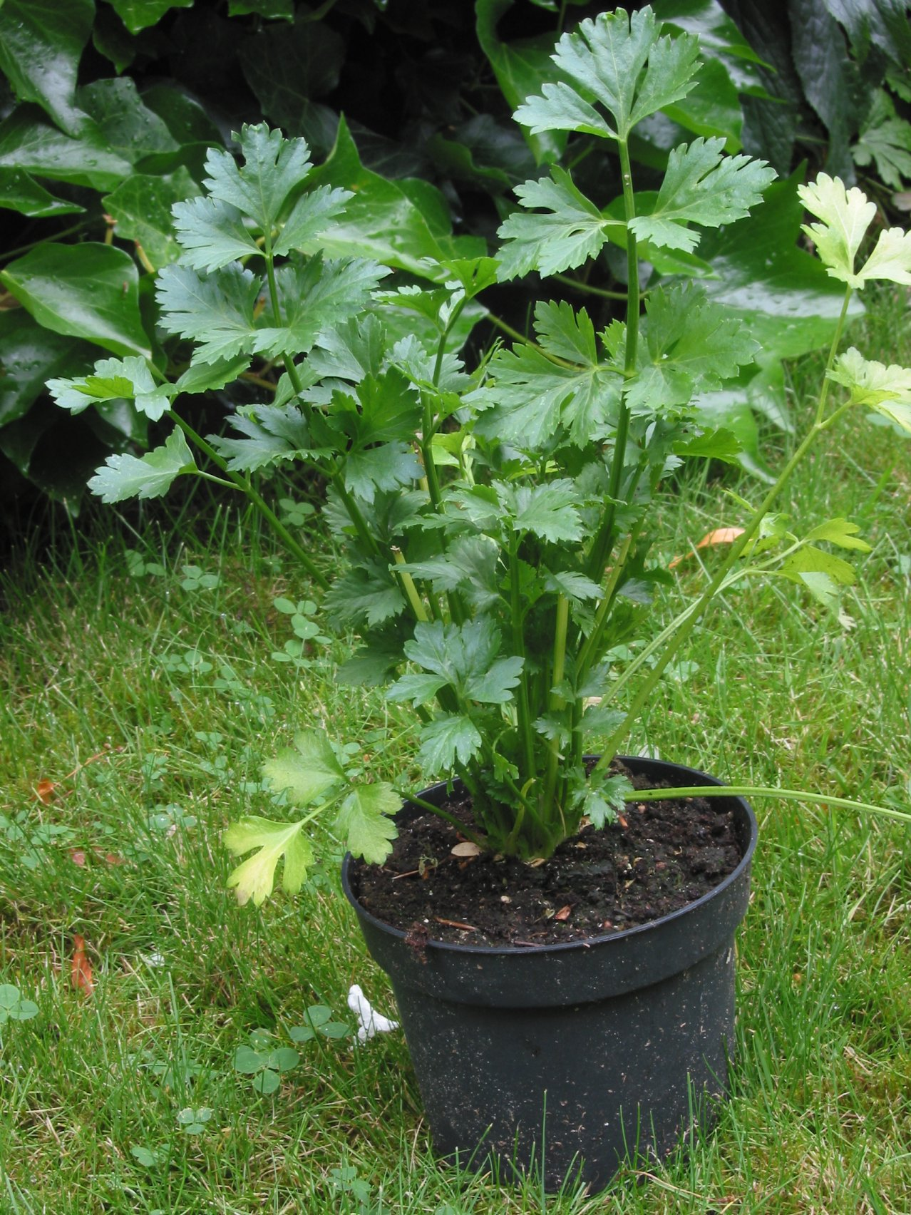 (Snijselderij) Apium graveolens leaf cellery